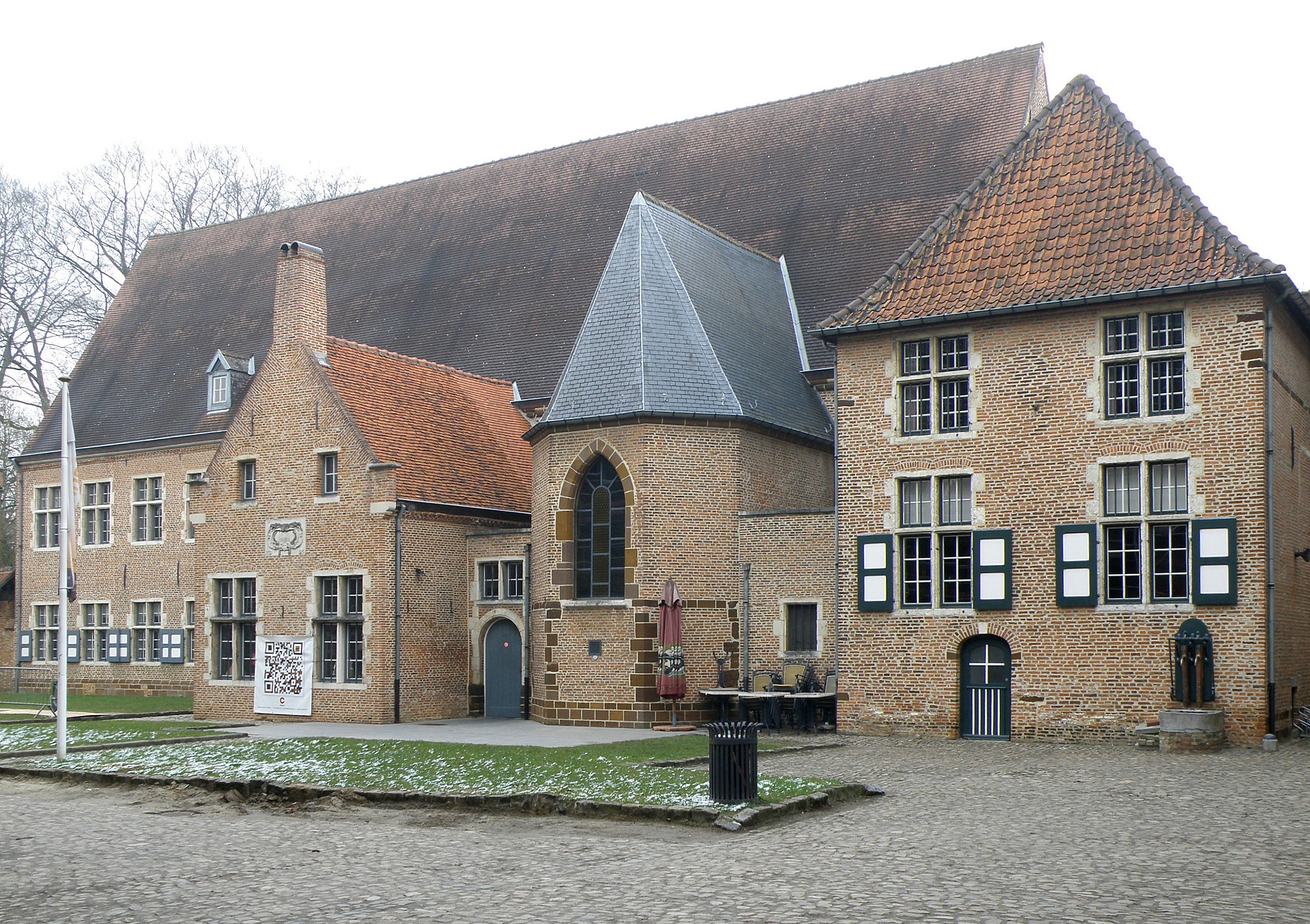 Diest (prov. de Brabant-Flamand, Belgique). Béguinage, édifice de l'infirmerie, sise Infirmeriestraat, derrière l'église.